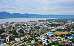 Phayao province